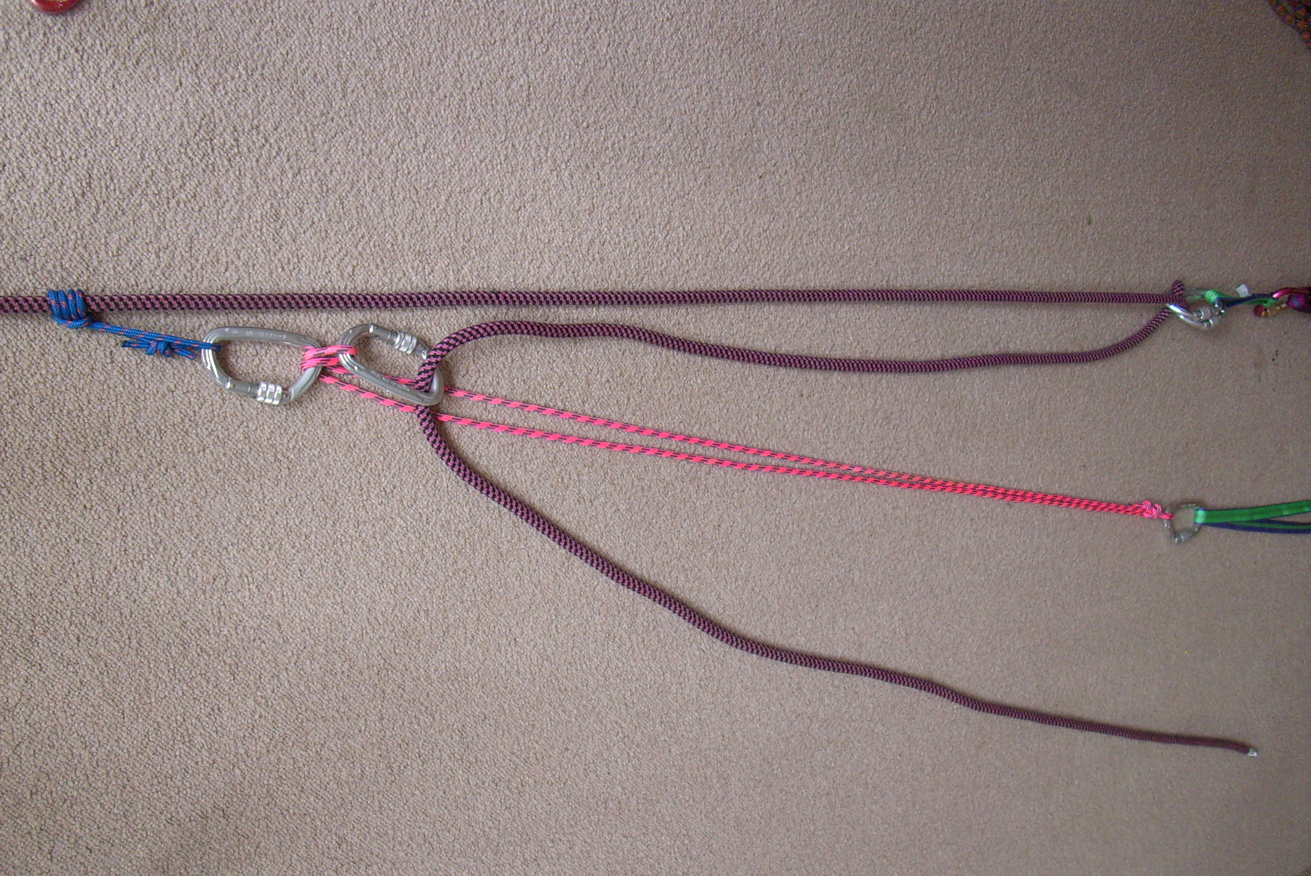 Schweizer Flaschenzug - Anfangsposition vor dem Hub, die Rücklaufsperre blockiert, das Zugseil ist entlastet, der Umlenkpunkt an der kurzen Prusikschlinge ist maximal weit weg geschoben und die lange Schlinge ganz gestreckt. Der nächste Hub kann beginnen.